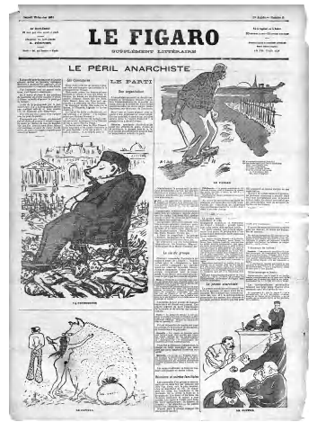 Le péril anarchiste